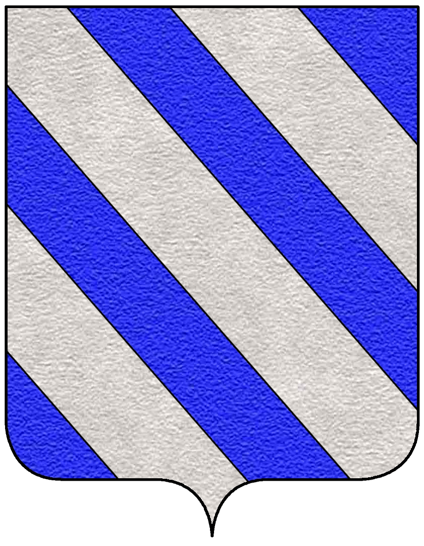 Stemma della famiglia Fieschi